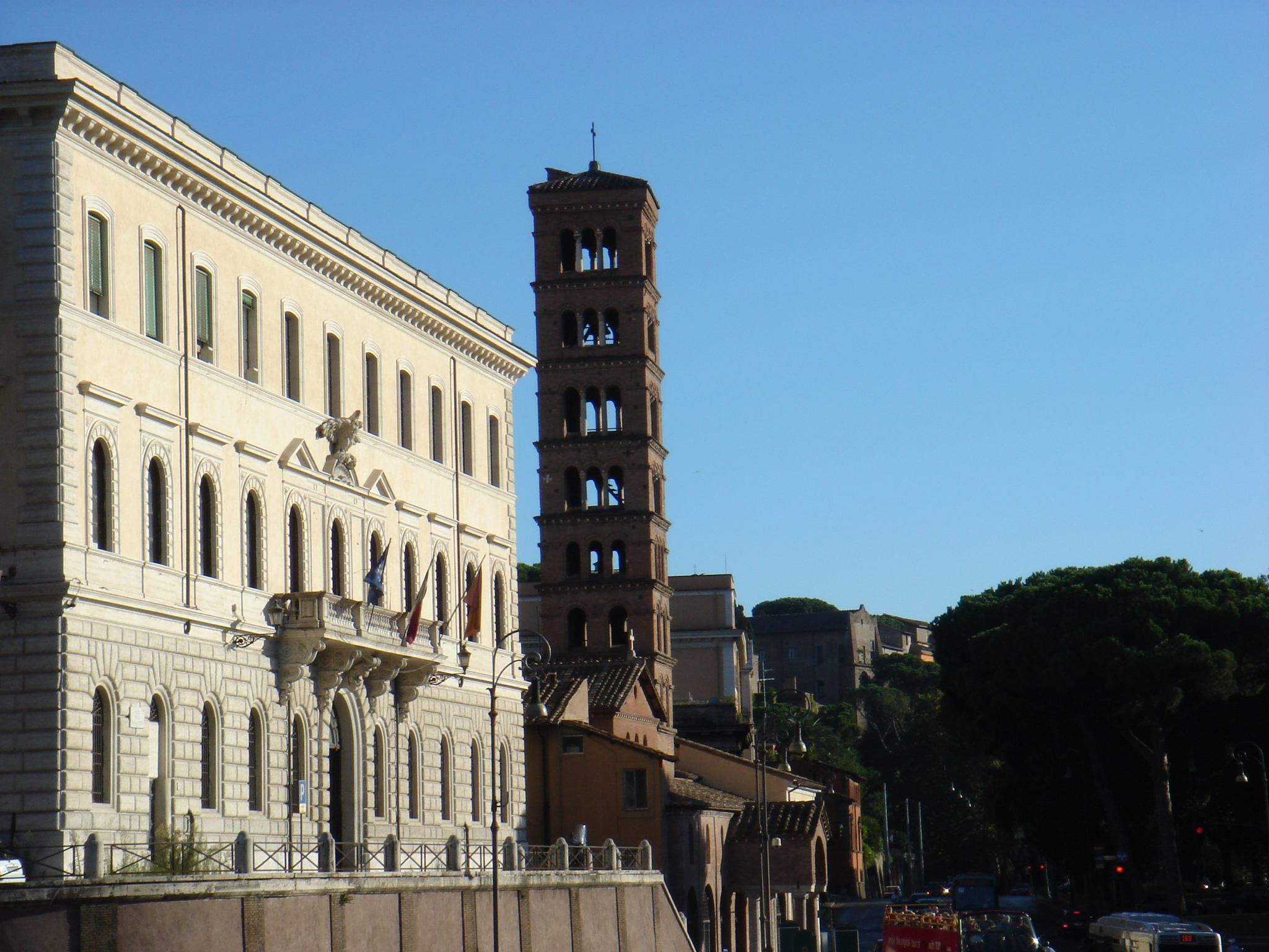 Roma, piazza Bocca della Verità, palazzo ex Pantanella. Di fianco, Santa Maria in Cosmedin. Sullo sfondo, l'Aventino.